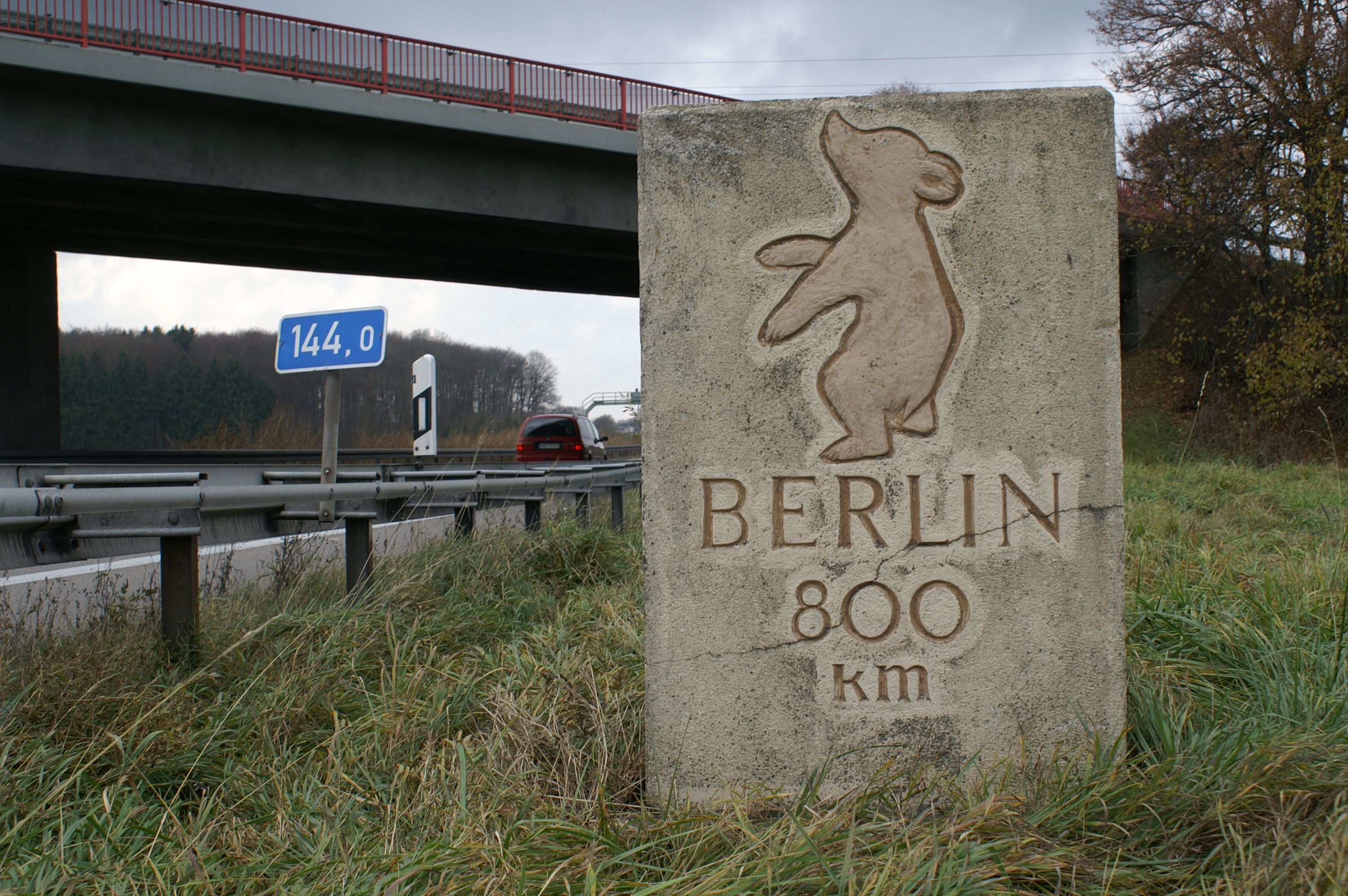 Sogenannter „Berliner Meilenstein“ an der Autobahn München-Stuttgart, wenige Kilometer vor dem Drackensteiner Hang. Der Beschluß, die „Berliner Meilensteine“ entlang der A 8 aufzustellen wurde den obersten Straßenbaubehörden der Länder durch ein Rundschreiben des Bundesverkehrsministeriums vom 24. November 1953 mitgeteilt. Fünf dieser Steine sollten dabei in Bayern zur Aufstellung kommen.